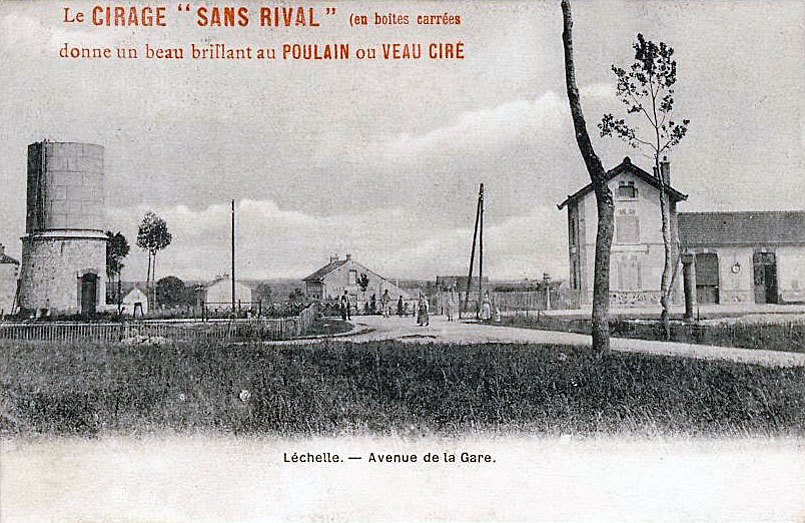 Léchelle - Avenue de la gare.